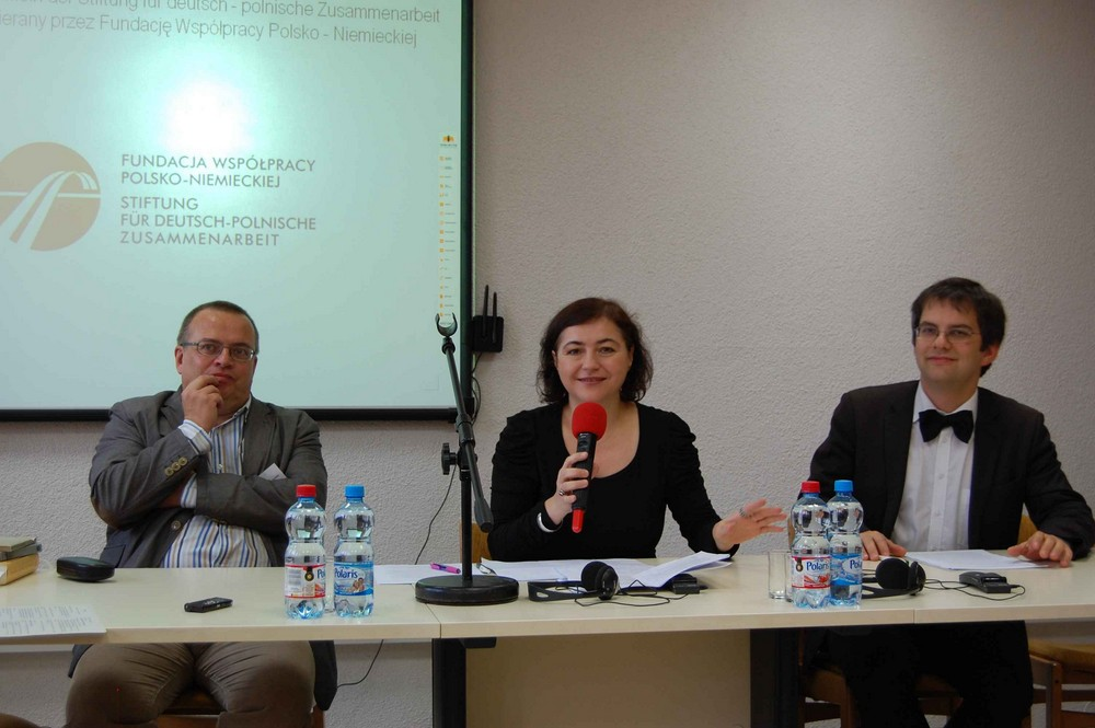 PIN–Instytut Śląski w Opolu, Colloquium 13. November 2012